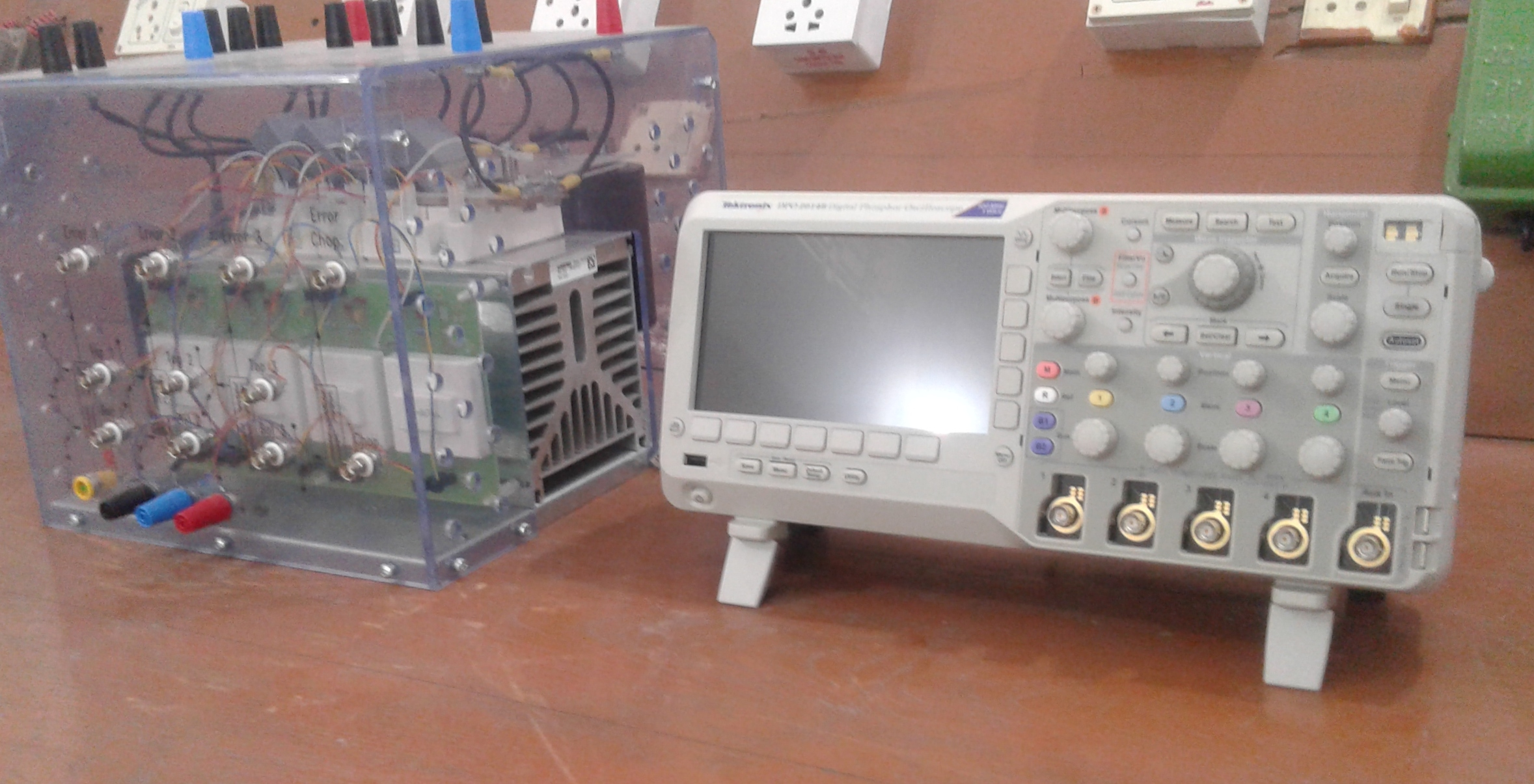 একটি টেবিলের উপর ওসিলোস্কোপ রাখা আছে